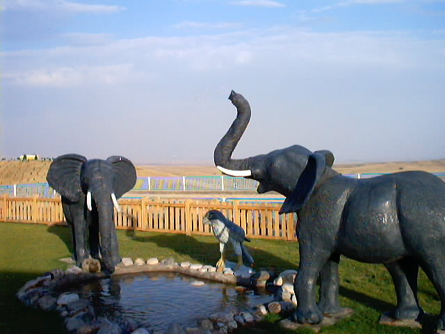 فیل های انیماترونیک ساخت شرکت تحقیقاتی کبریا